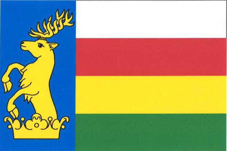 Halámky vlajka